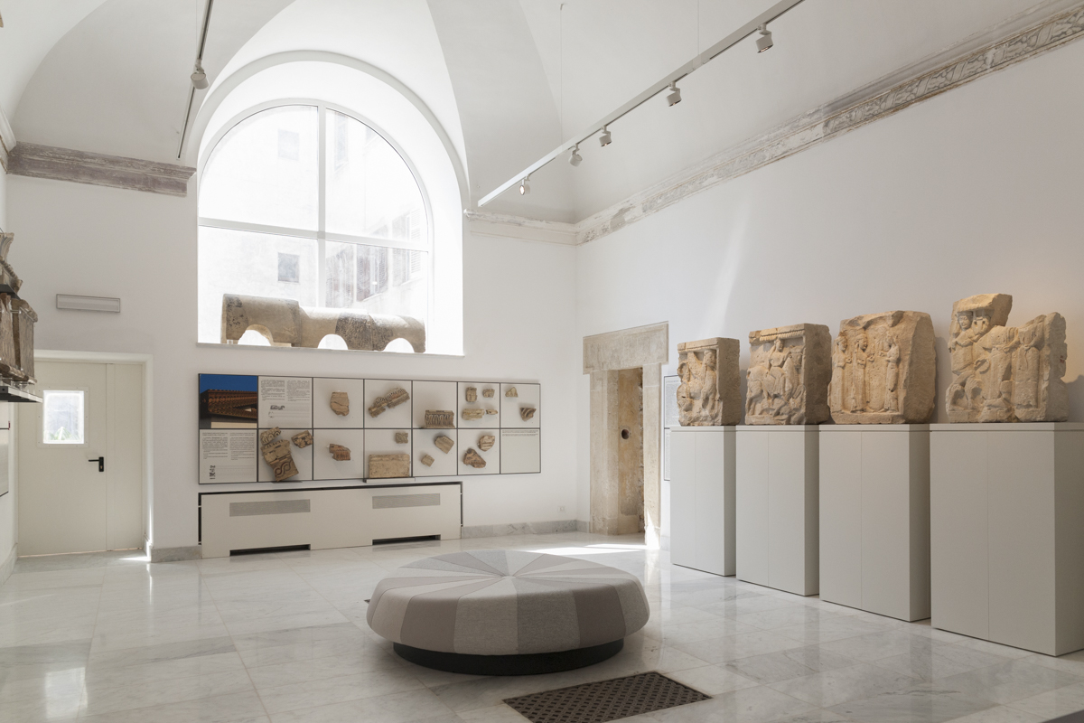 Sala con le Piccole Metope di Selinunte e altri elementi architettonici nel nuovo allestimento del Museo Archeologico Salinas